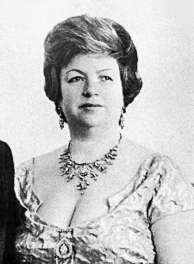 Portrait de Wassila Bourguiba épouse du président Habib Bourguiba, 1962 This file has been extracted from another file: Photo Bourguiba et Wassila 1962.jpg